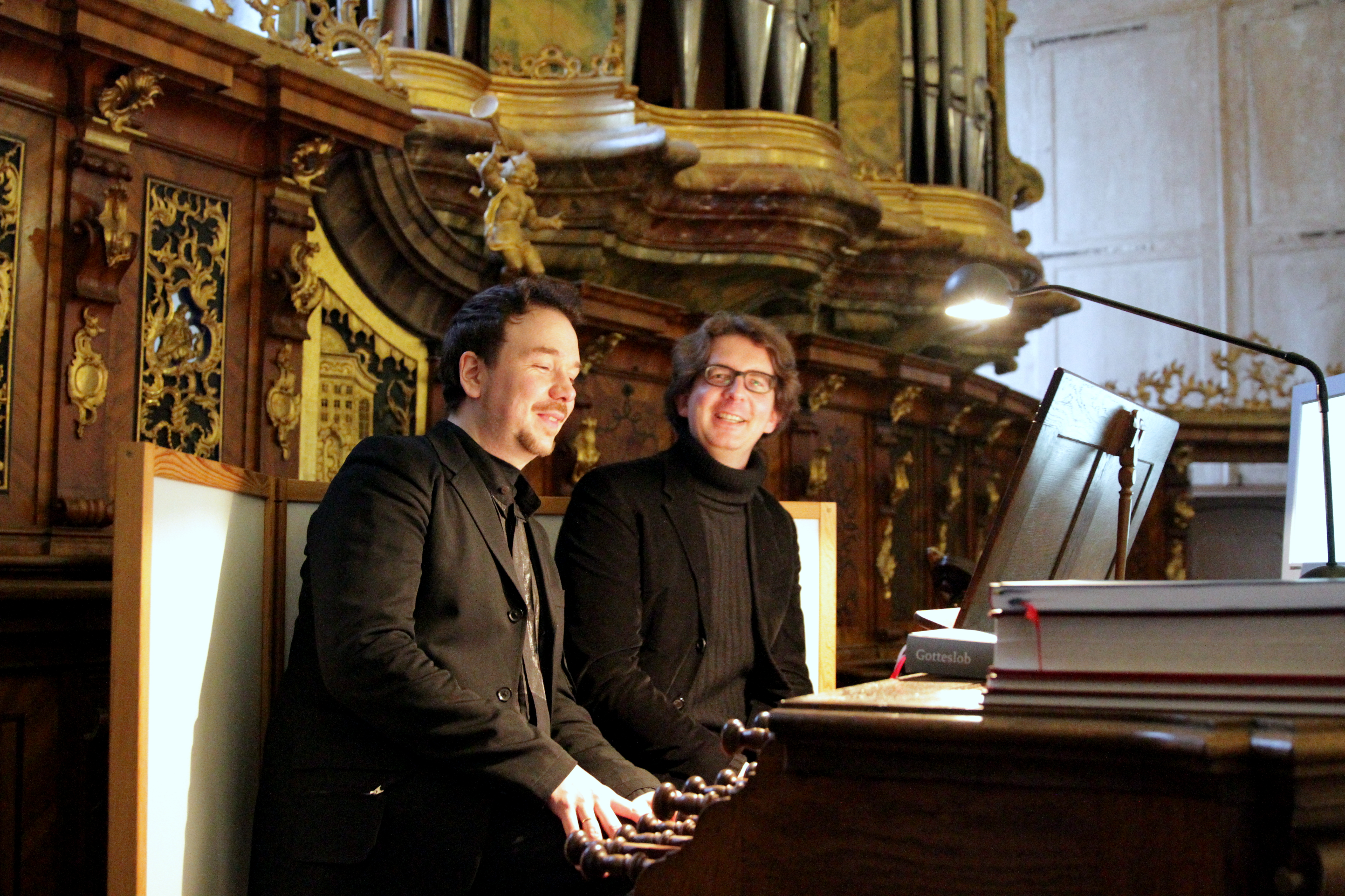 Tonspuren 2014 - Florian Weber an der Orgel der Klosterkirche Irsee Festivalsommer This photo was created with the support of donations to Wikimedia Deutschland in the context of the CPB project "Festival Summer". This file is made available under the Creative Commons CC0 1.0 Universal Public Domain Dedication. The person who associated a work with this deed has dedicated the work to the public domain by waiving all of their rights to the work worldwide under copyright law, including all related and neighboring rights, to the extent allowed by law. You can copy, modify, distribute and perform the work, even for commercial purposes, all without asking permission. Thomas Springer Personality rights warningAlthough this work is freely licensed or in the public domain, the person(s) shown may have rights that legally restrict certain re-uses unless those depicted consent to such uses. In these cases, a model release or other evidence of consent could protect you from infringement claims.